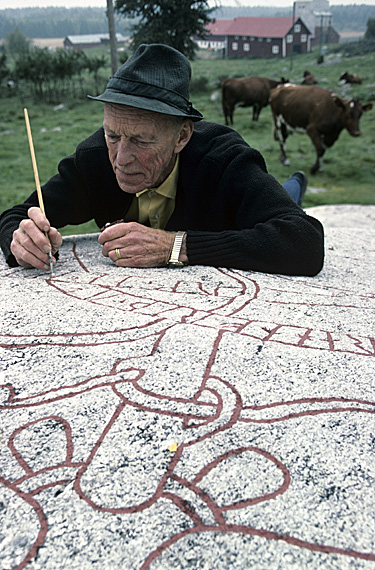 Runforskaren Sven B. F. Jansson, "Run-Janne", målar i runorna på hällen. Riksantikvarie 1966-1972.